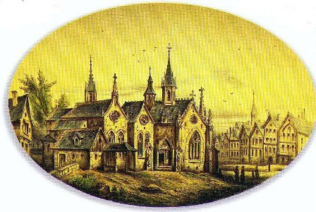 Dessin de 1820 représentant l'hôpital St-Jacques dans son environnement au Moyen Âge